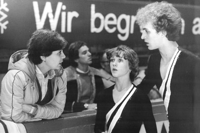 Irina Rodnina, Ludmilla Koblewa, Andrej Kalitin ADN-ZB Thieme 26.11.82 Karl-Marx-Stadt: "Pokal der Blauen Schwerter" im Eiskunstlaufen - Irina Rodnina betreut Nachwuchspaar- Von der erfolgreichsten Eiskunstläuferin aller Zeiten, Irina Rodnina (l.), wird das talentierte Moskauer Nachwuchspaar Ludmilla Koblewa - Andrej Kalitin betreut. Die Schützlinge der mehrfachen Weltmeisterin und Olympiasiegerin belegten in der Entscheidung der Paare am 25.11.82 mit 4,2 Punkten den dritten Rang.